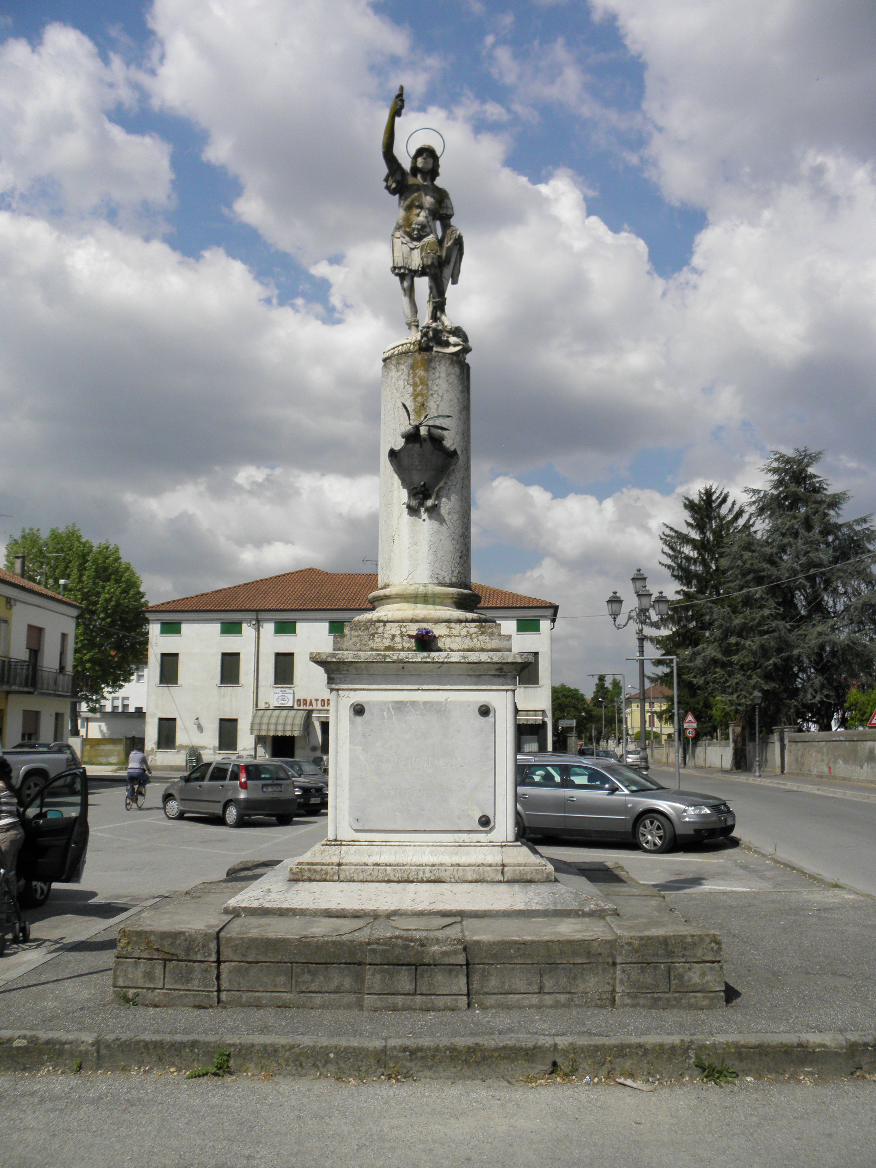 Trecenta: il monumento dedicato a San Giorgio sito nella piazza antistante l'omonima chiesa parrochiale.